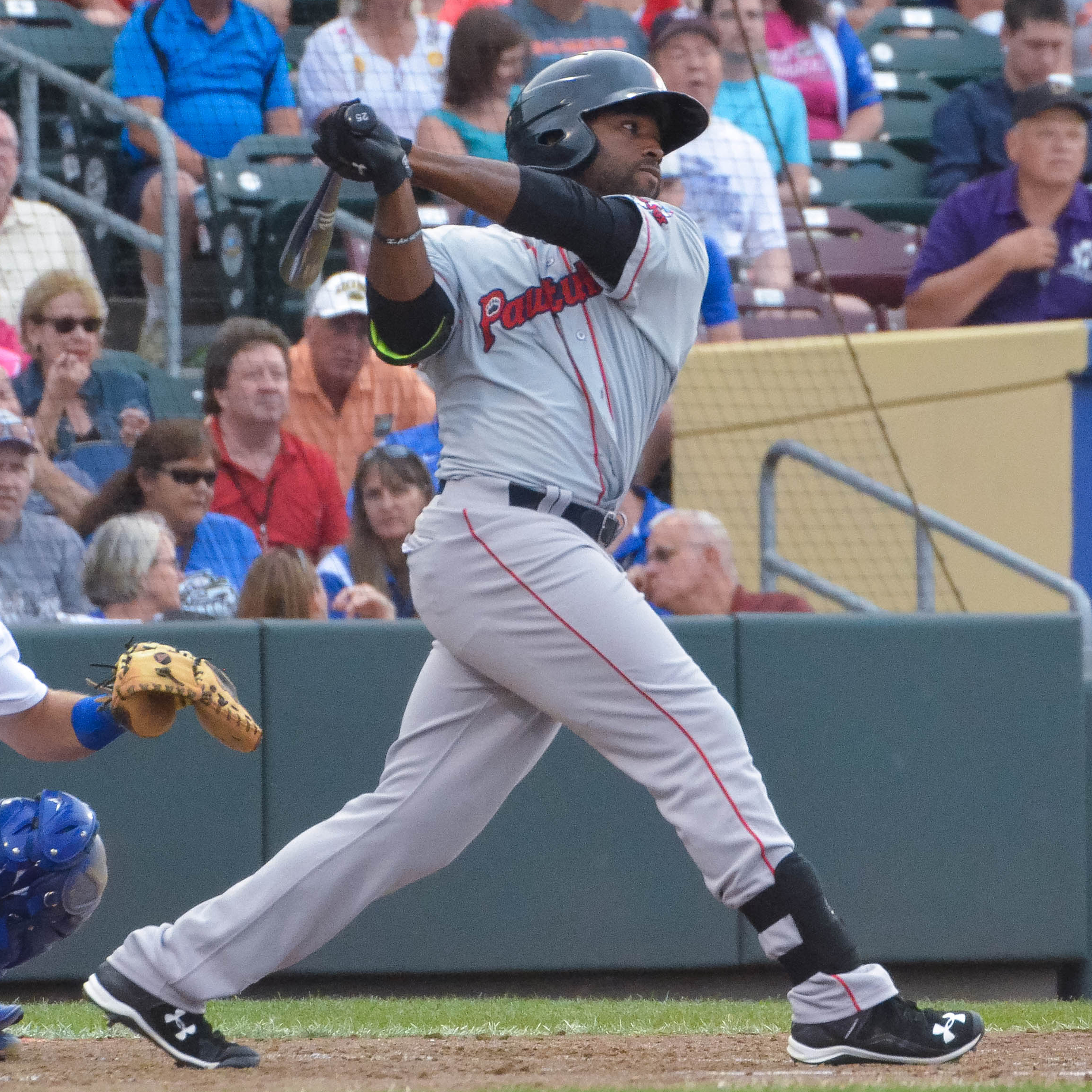 Jackie Bradley